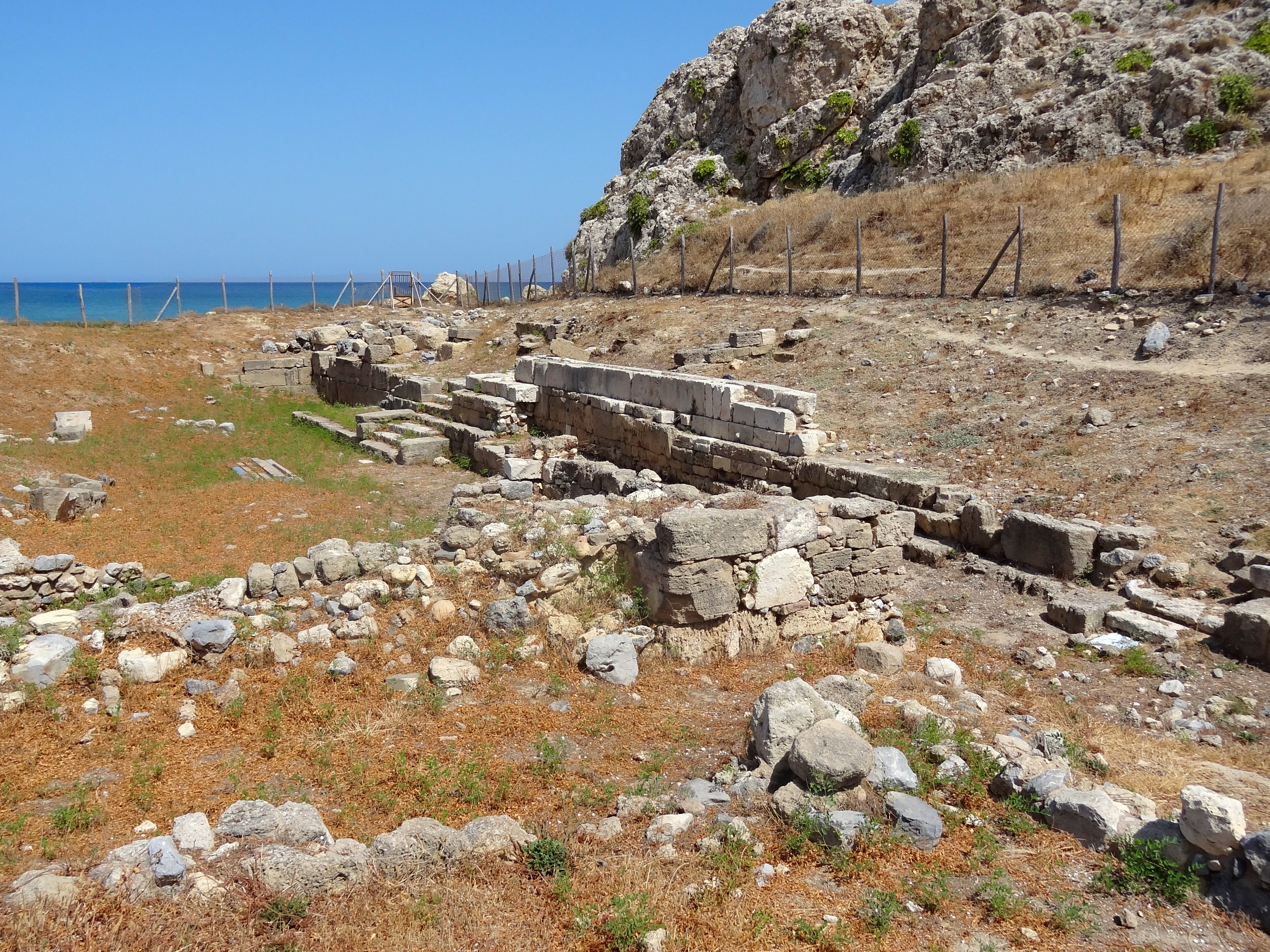 Heiligtum des Zeus Thenatas von Amnissos bei Iraklio, Kreta, Griechenland